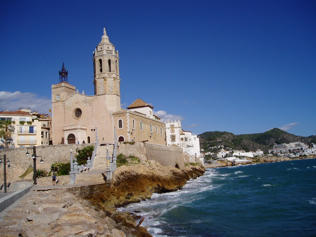 Vista sud de l'església parroquial de Sitges